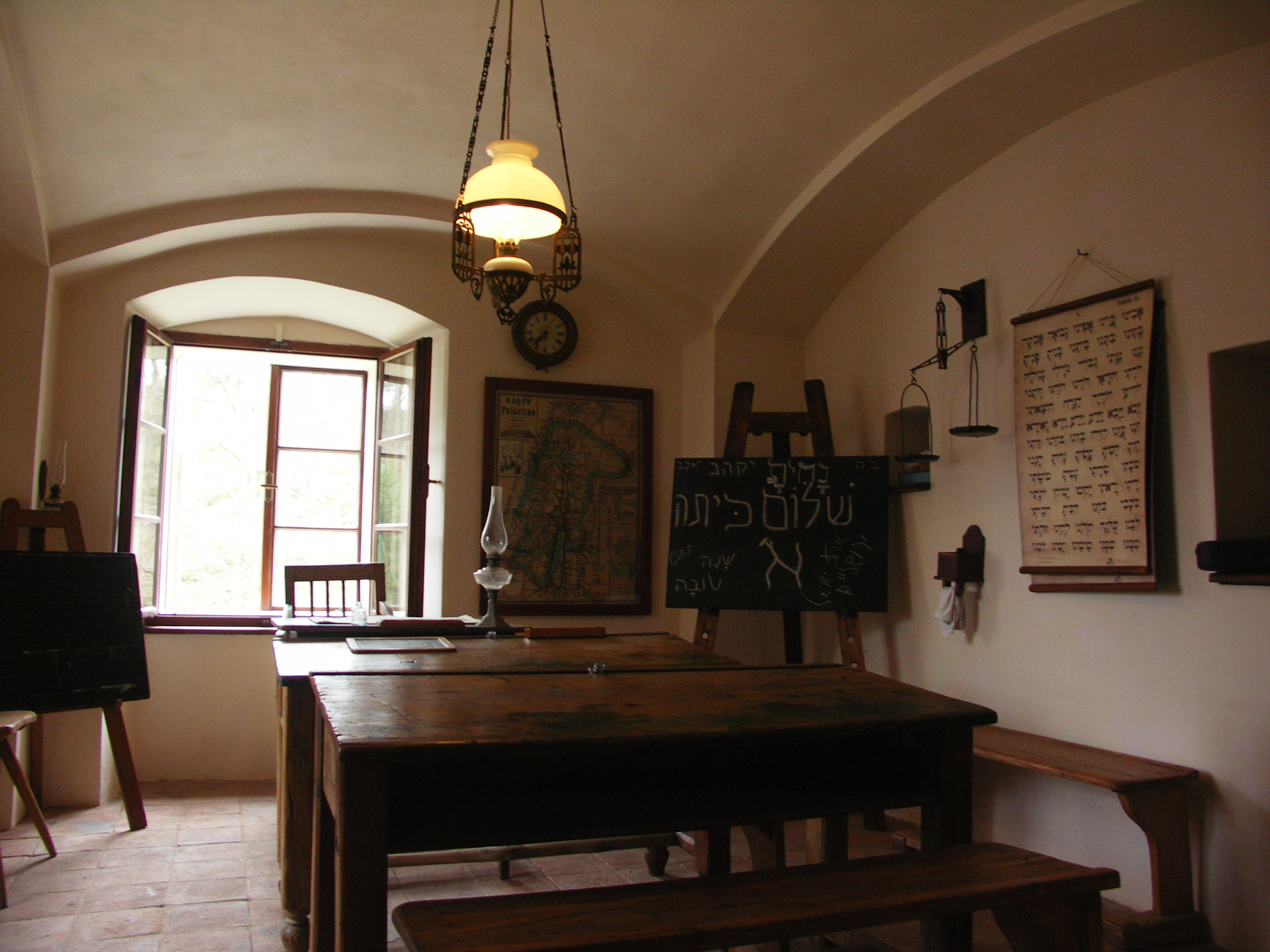 Synagoga (Úštěk), Úštěk 95